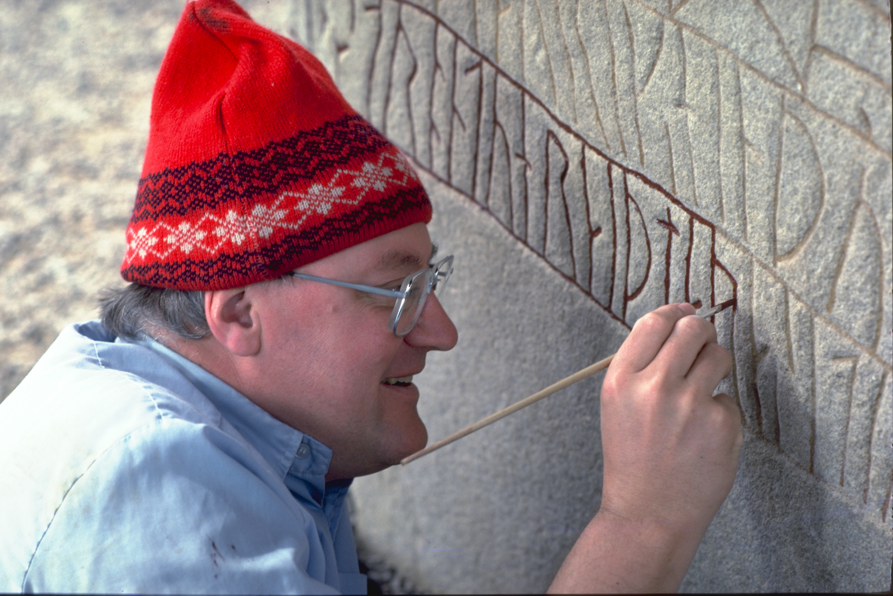 Imålning av runorna på Rökstenen. Motiv: Ög136 Rök Nyckelord: Raä-Fastigheter, Runor Kategori: Arbetsmotiv, Runristning/runsten Imålning av runorna på Rökstenen av Helmer Gustavson. Ög136 Rök.